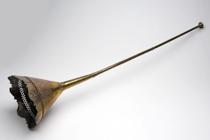 Deze natuurlijke hoorn wordt toppelings geblazen. Het geluid wordt geproduceerd door de vibratie van de lippen van de speler. De hoorn (nafir) wordt in Marokko vooral geassocieerd met de islamitische vastenmaand Ramadan. Traditioneel werd daar het onderbreken van de vastendag (al-iftar) precies na het vijfde en laatste gebed bij zonsondergang, door het blazen op deze hoorn aangekondigd. Op dezelfde wijze werden de mensen 's ochtends vroeg weer wakker gemaakt voor de sahoer-maaltijd, de laatste maaltijd voor zonsopgang. De speler (neffar) trekt elke avond gedurende Ramadan door de wijk met zijn hoorn. Zijn dienst wordt pas aan het eind van de maand beloond met de zakat al-iftar, een liefdadigheidsgave bij het einde van de vastenmaand Ramadan. Dit gebruik vindt men alleen in de stad, vooral in de oude gedeelte (de medina), en de volkswijken. Op het platteland bestaat het gebruik niet. De functie van dit instrument houdt niet op bij deze rituele handeling. Het wordt ook als muziekinstrument bespeeld door diverse volksmuziekgroepen, zoals bijvoorbeeld de Daqqa Marrakshiyya uit Marrakech, of tijdens gemeenschaps- en privéfeesten, zoals bruiloften en besnijdenissen. De Moren introduceerden het instrument overigens ook in Spanje en Portugal waar het bekend is onder de naam anafil/ anafir. Ook in India wordt het aangetroffen onder de naam karna of karnay. De lange zilveren trompet, de nafiri, wordt ook aangetroffen in Maleisië, waar er vooral traditionele hofmuziek mee wordt gespeeld.